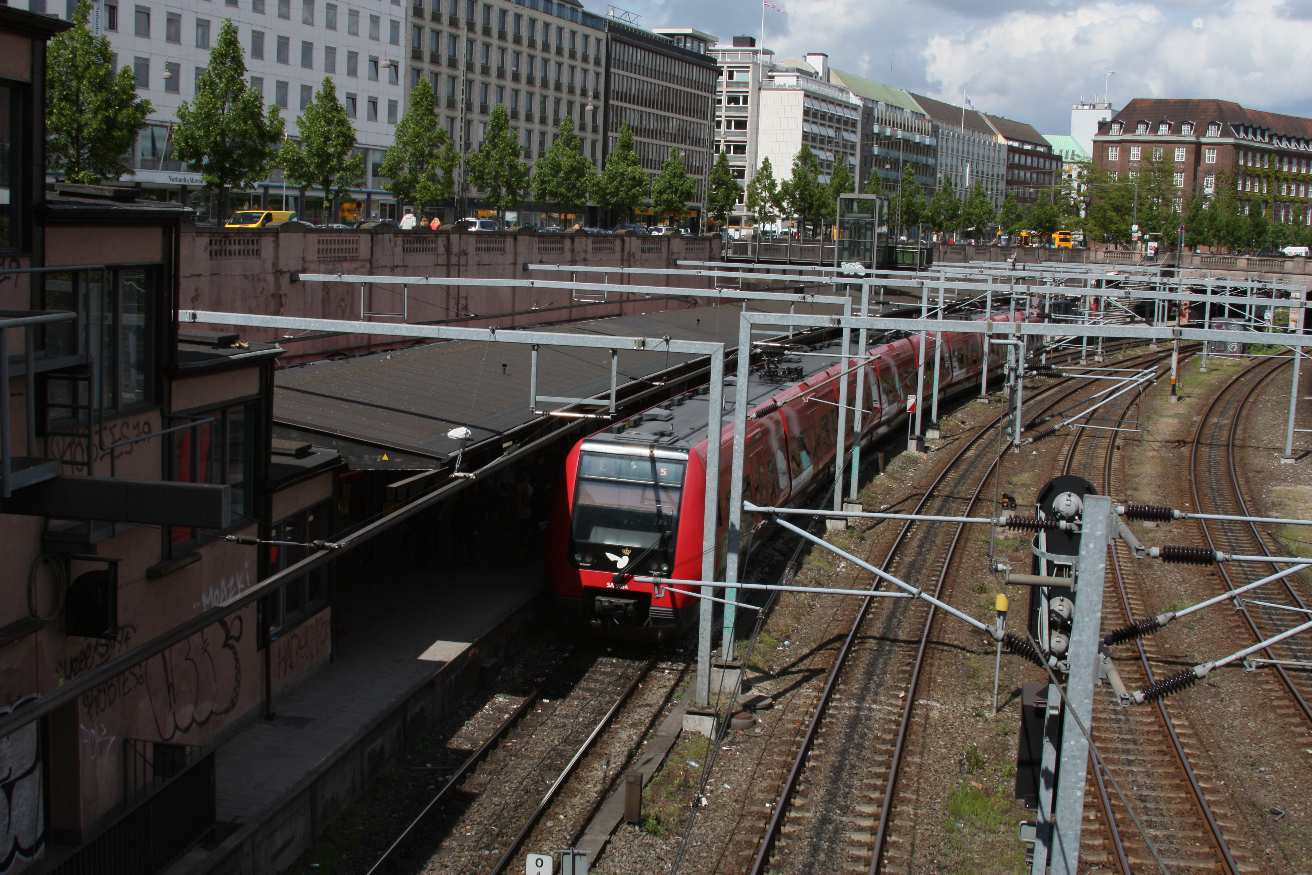 Kopenhagen 2009